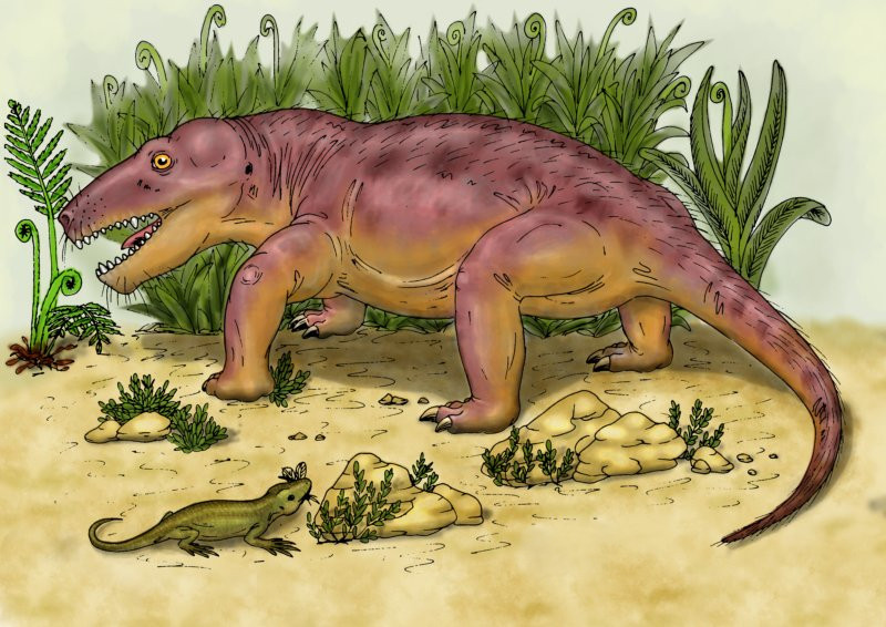 Dinocephalian Niaftasuchus zekkeli drawing (after Ivakhnenko)